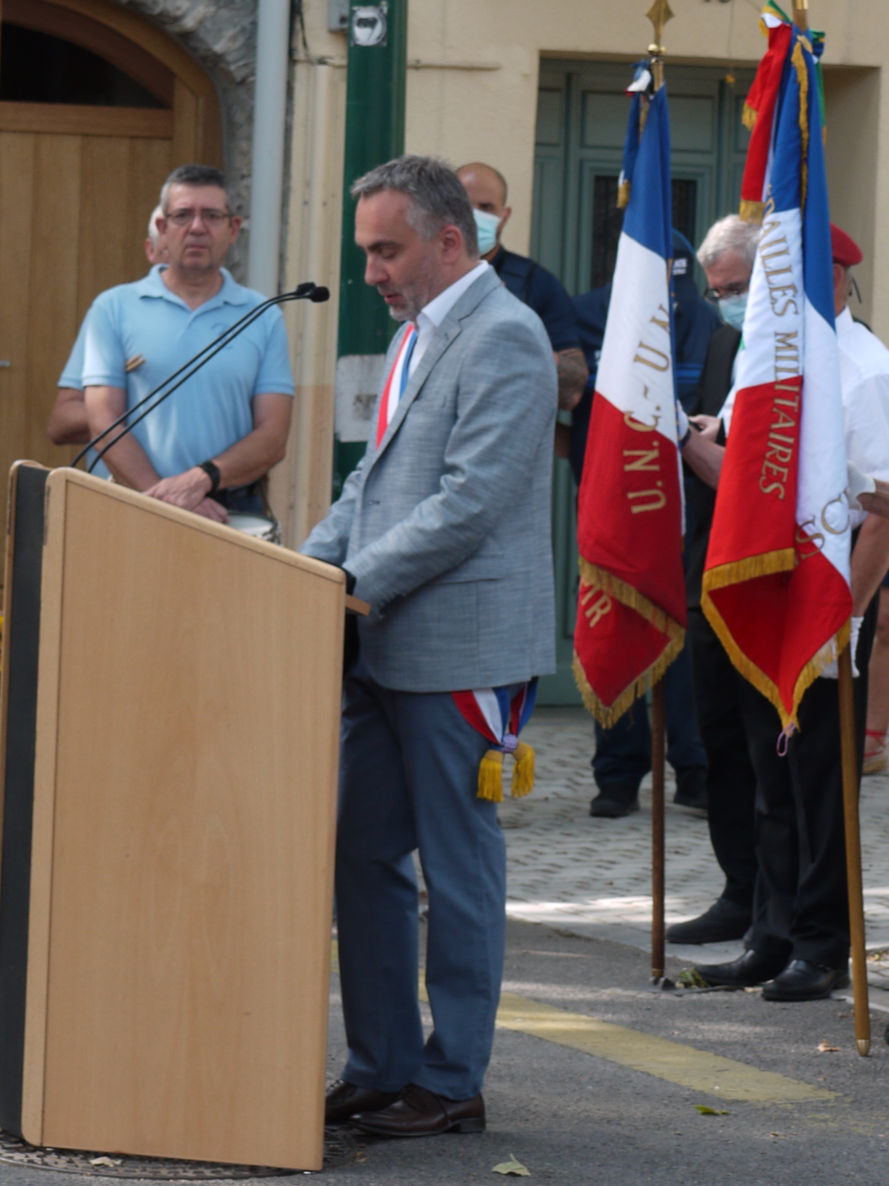 Cérémonie du 14 juillet à Céret en 2020, discours du maire Michel Coste.